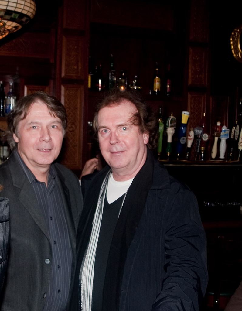 Al Greenwood (Foreigner) & Ian McDonald (King Crimson, Foreigner)